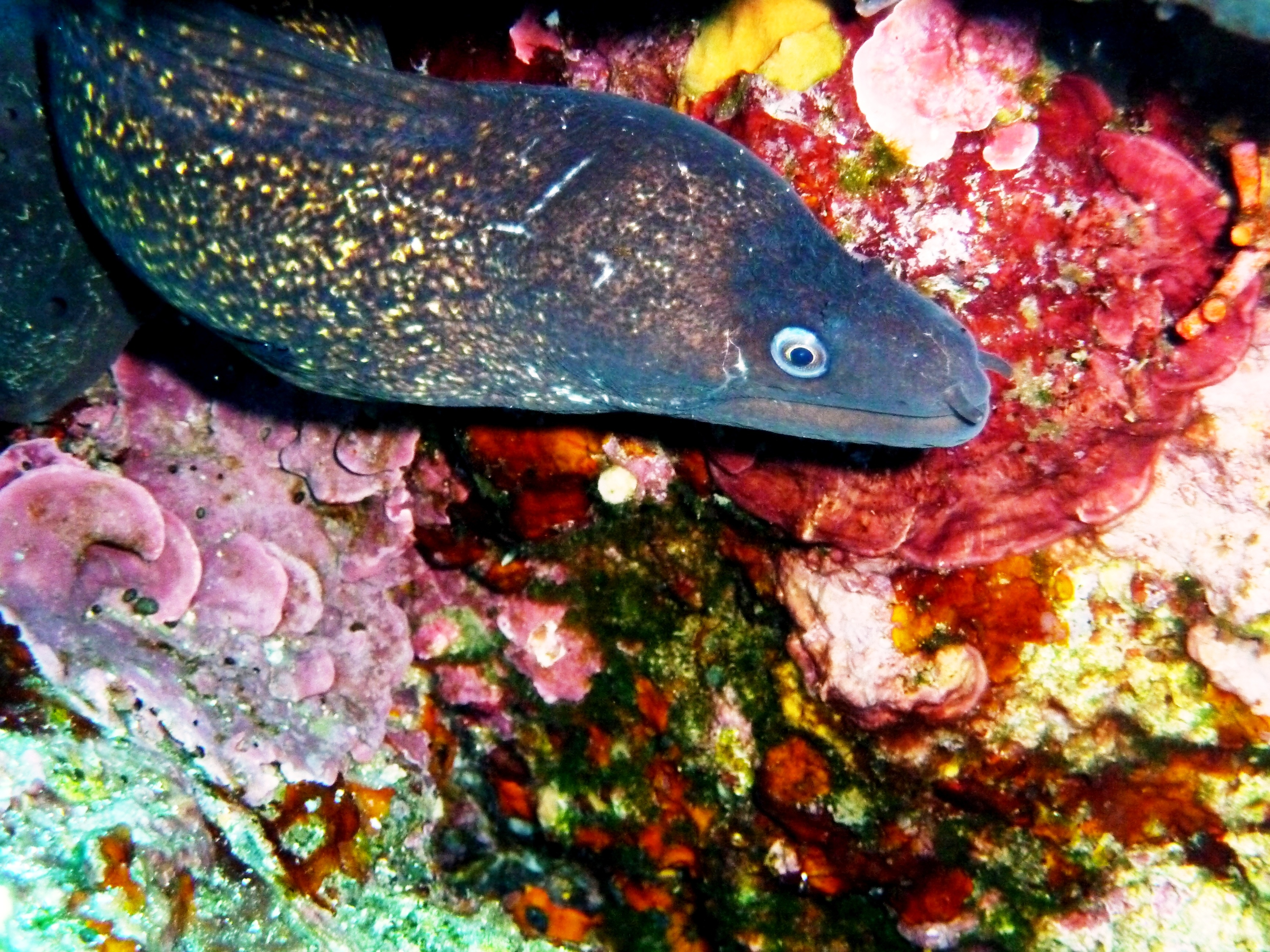 Murène, mer méditerranée